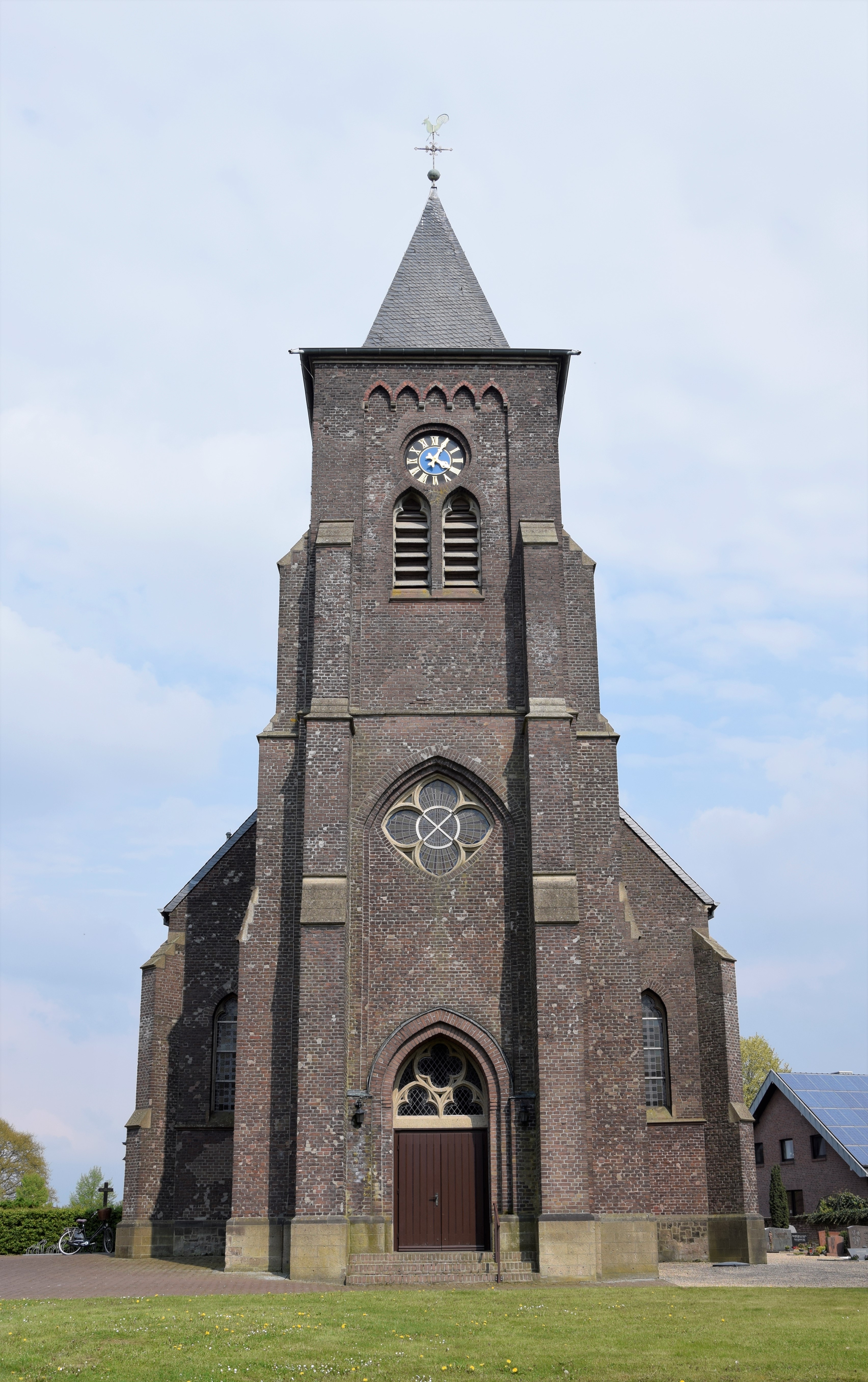 St. Petrus Hommersum, Baudenkmal Nr. 25 der Stadt Goch